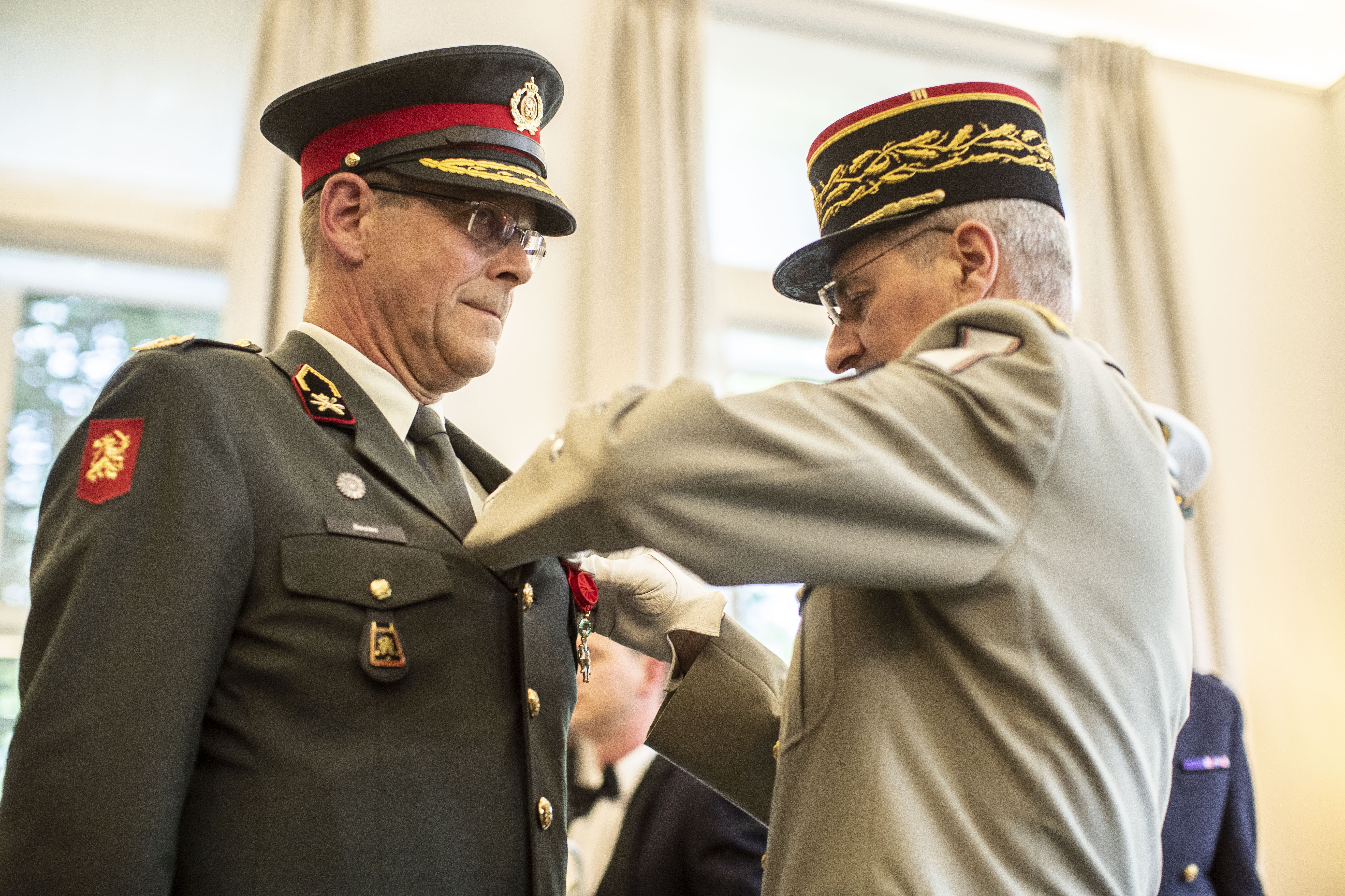 Commandant Landstrijdkrachten luitenant-generaal Leo Beulen heeft vandaag het Légion d'Honneur ontvangen. Hij krijgt Frankrijks hoogste onderscheiding voor zijn bijzondere inspanningen voor de Frans-Nederlandse samenwerking.